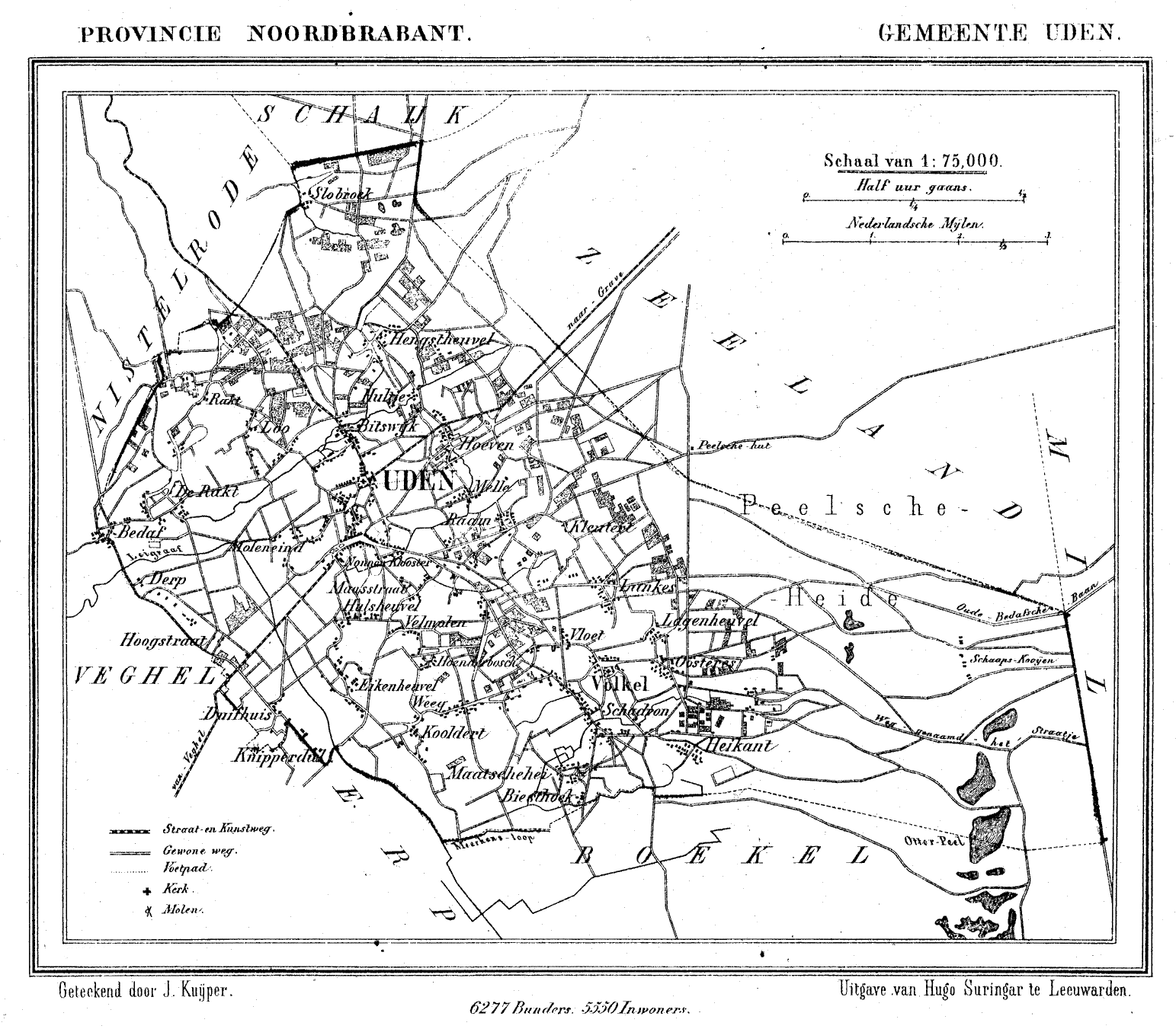 Nederland, Noord-Brabant, Gemeente Uden